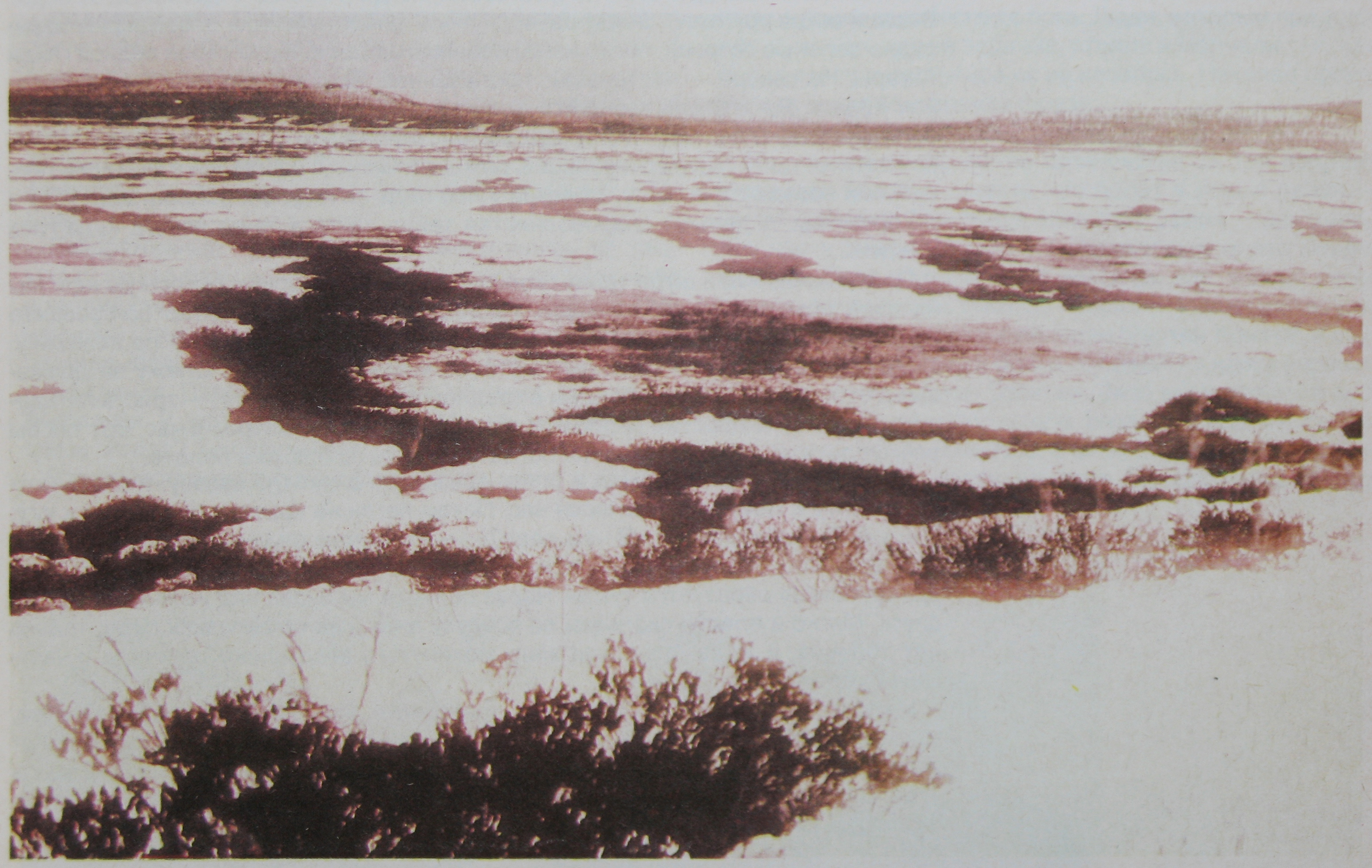 Tunguska. Leonid Kulik expedition in 1927-30.